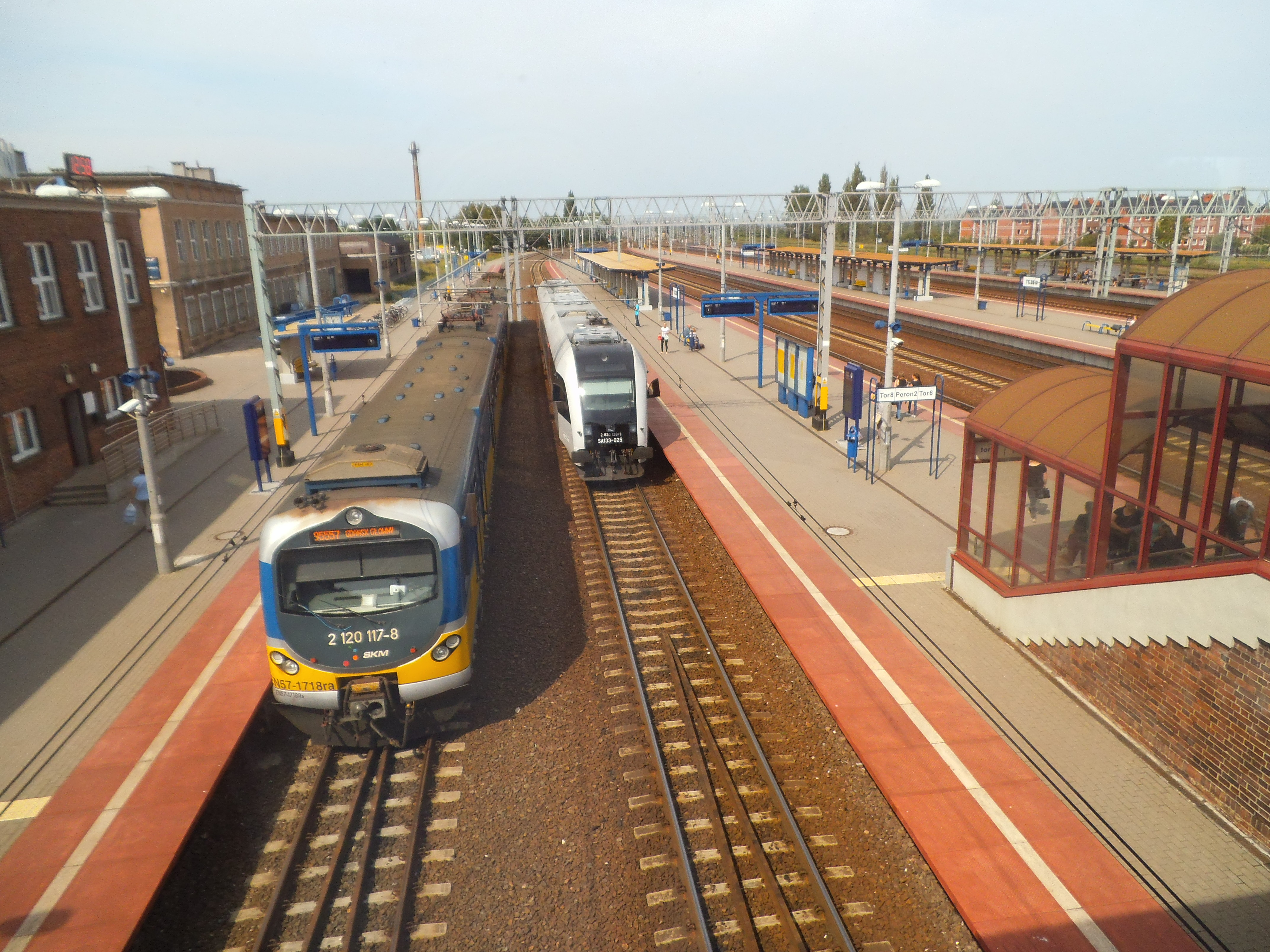 Tczew (stacja kolejowa)4